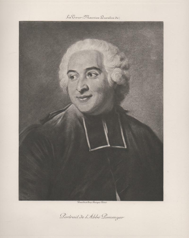 Abbé François-Emmanuel Pommyer, héliogravure d'après le portrait de Quentin de La Tour. Fin XIXe siècle.